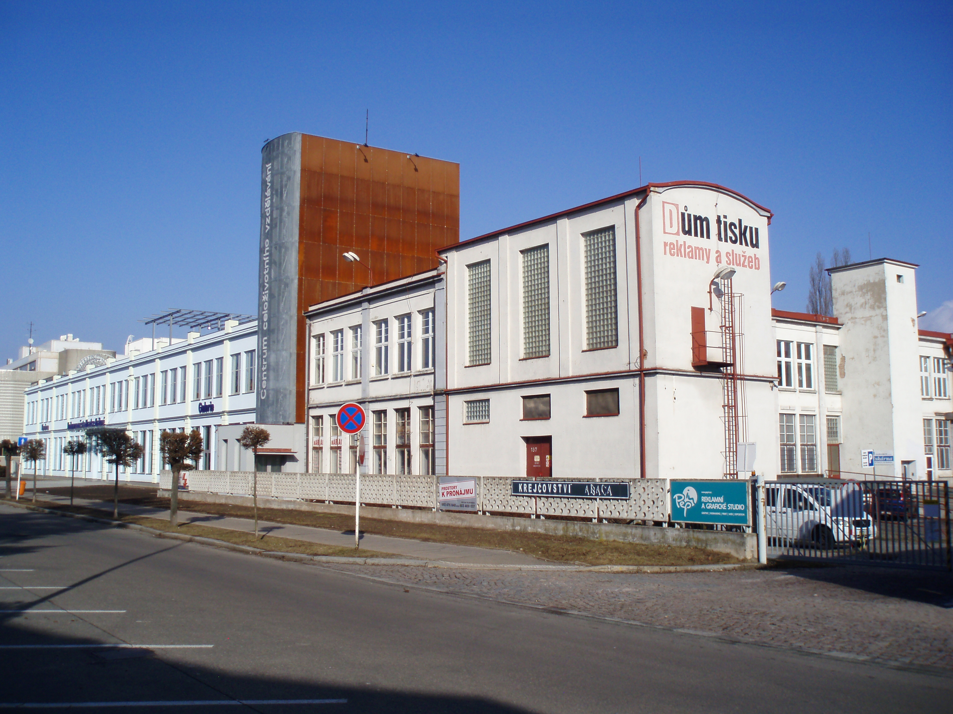 Bývalá Anningerova přádelna, dnes knihovna města